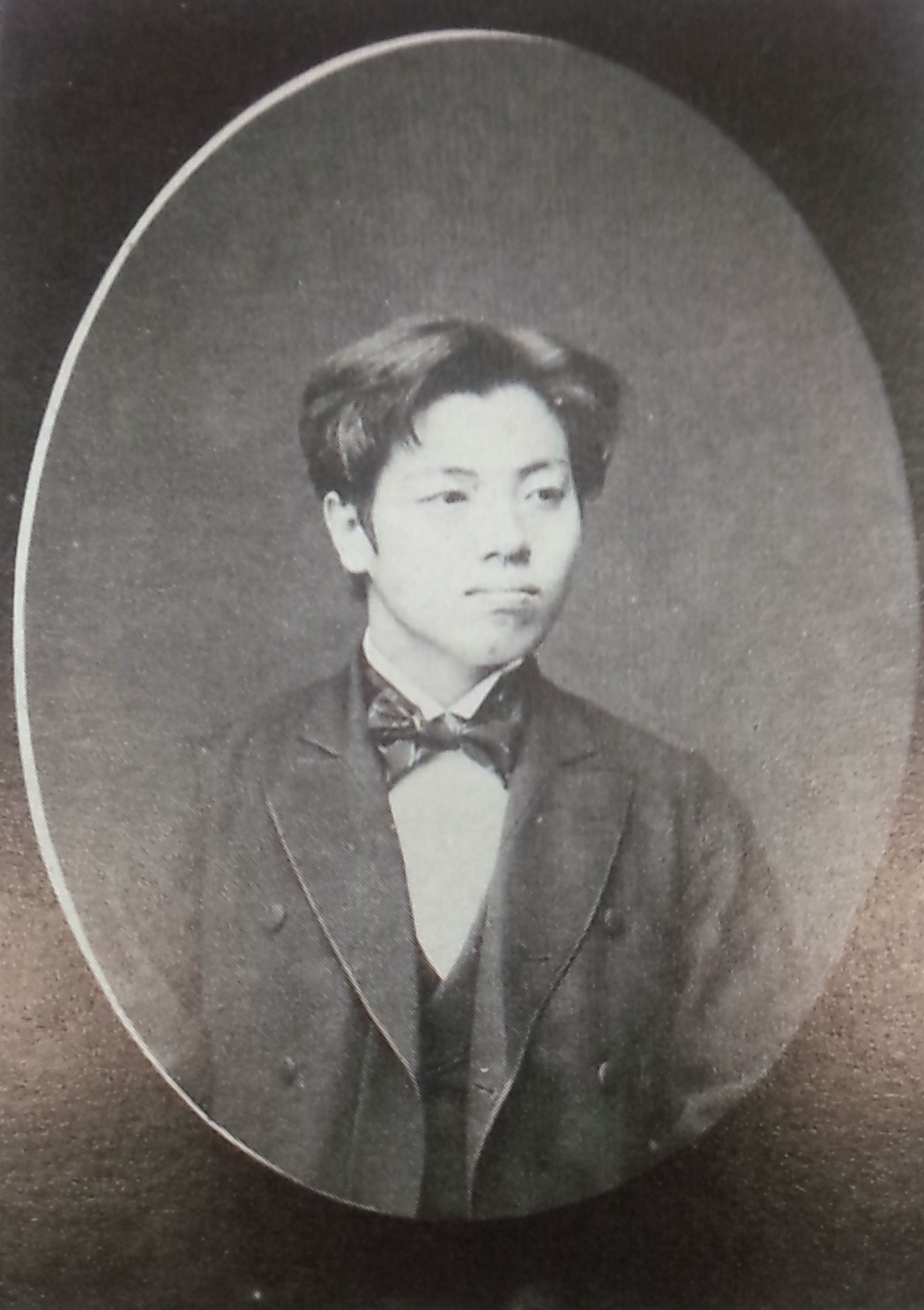 広橋賢光の肖像写真。